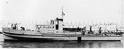 היכטה מורטה שהפכה לספינת המשמר אח"י פלמ"ח מ-19